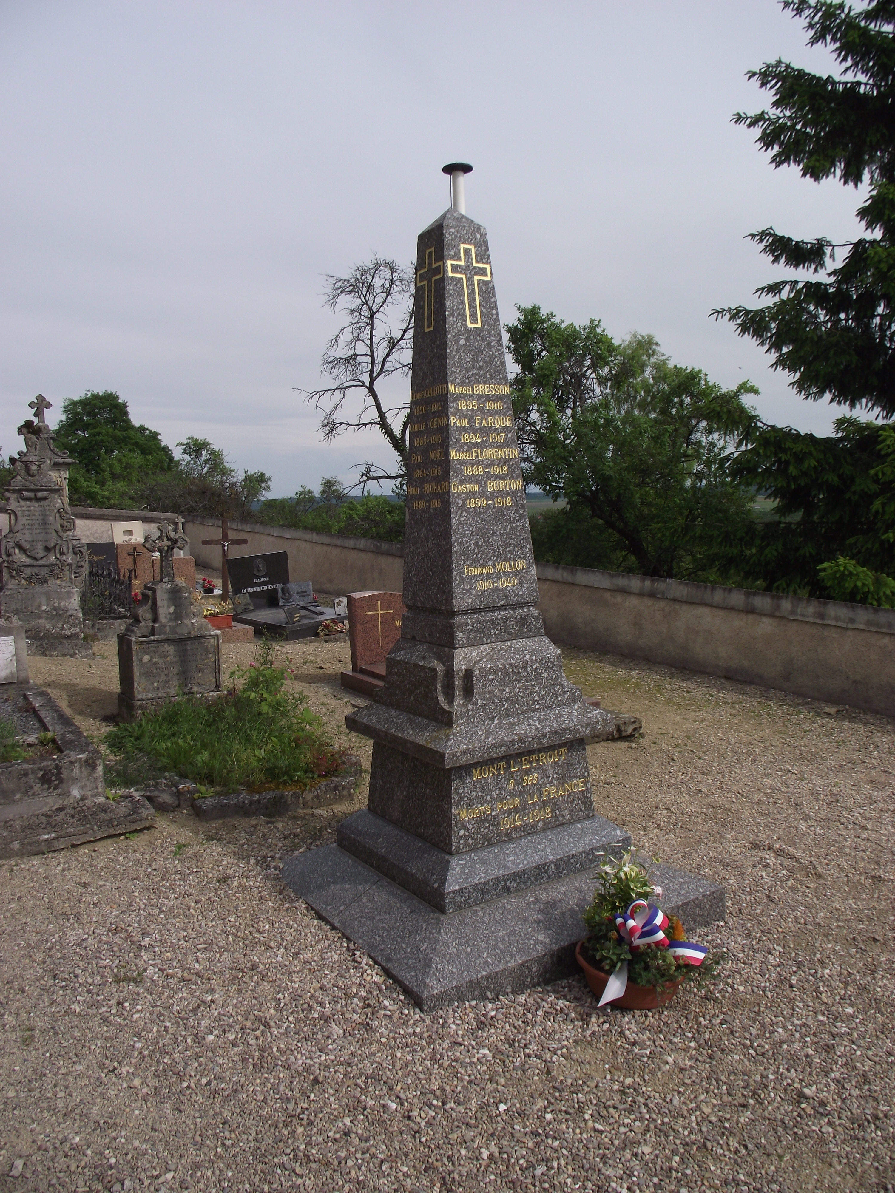 Mont-l'Étroit à ses enfants Morts Pour la France 1914-1918